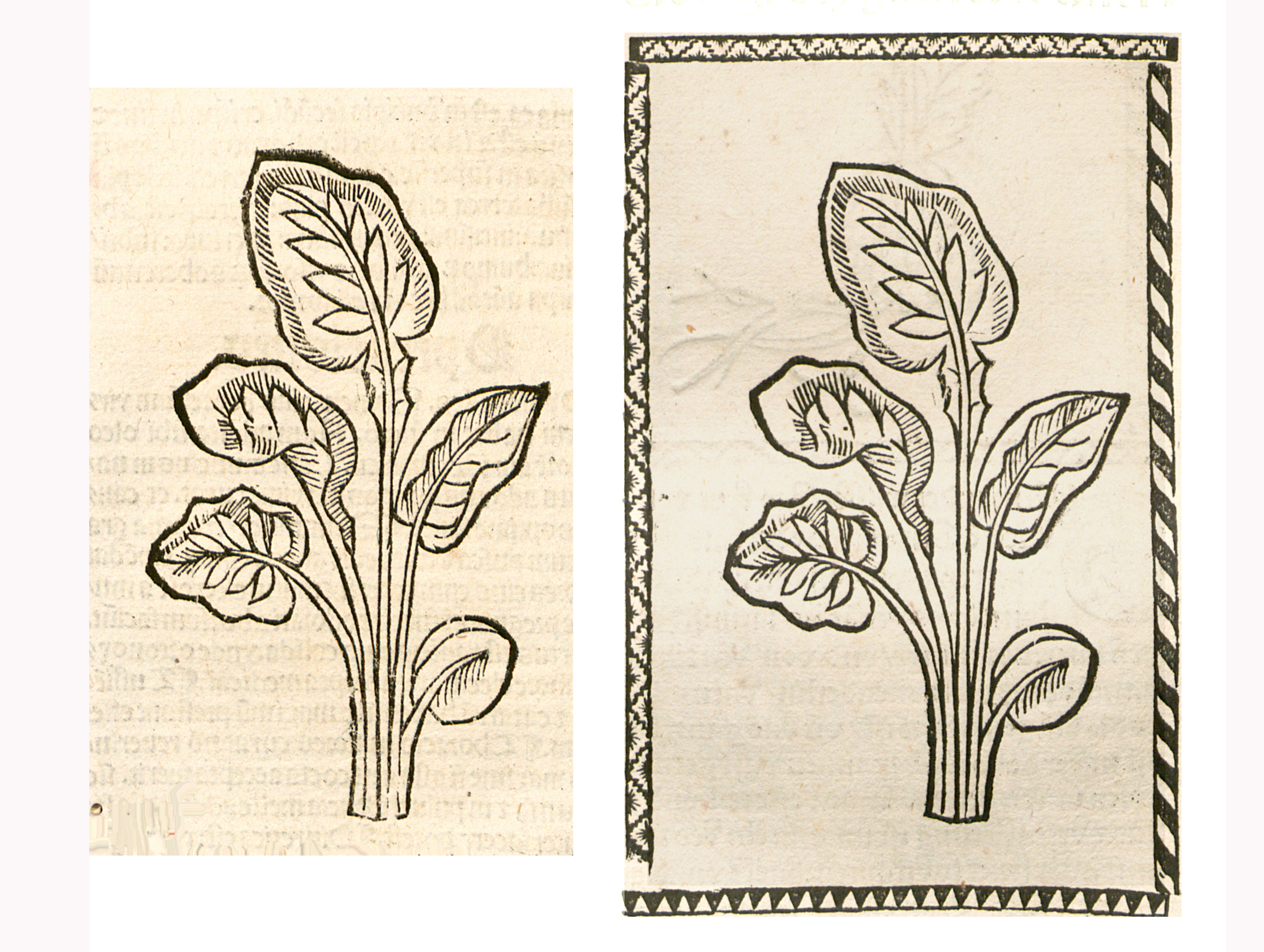 Abbildung von: Gross Gunsel (Pyrola rotundifolia)